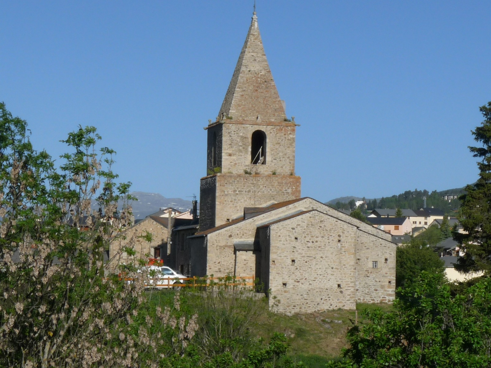 Eglise de Bolquère, P.O., France